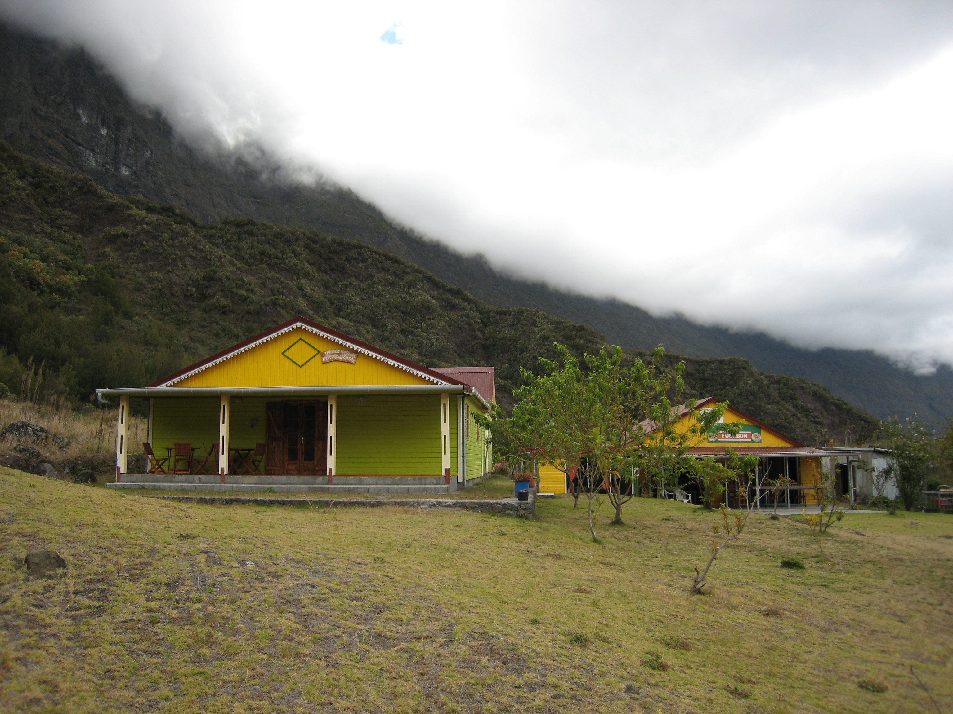 Une épicerie à Marla.